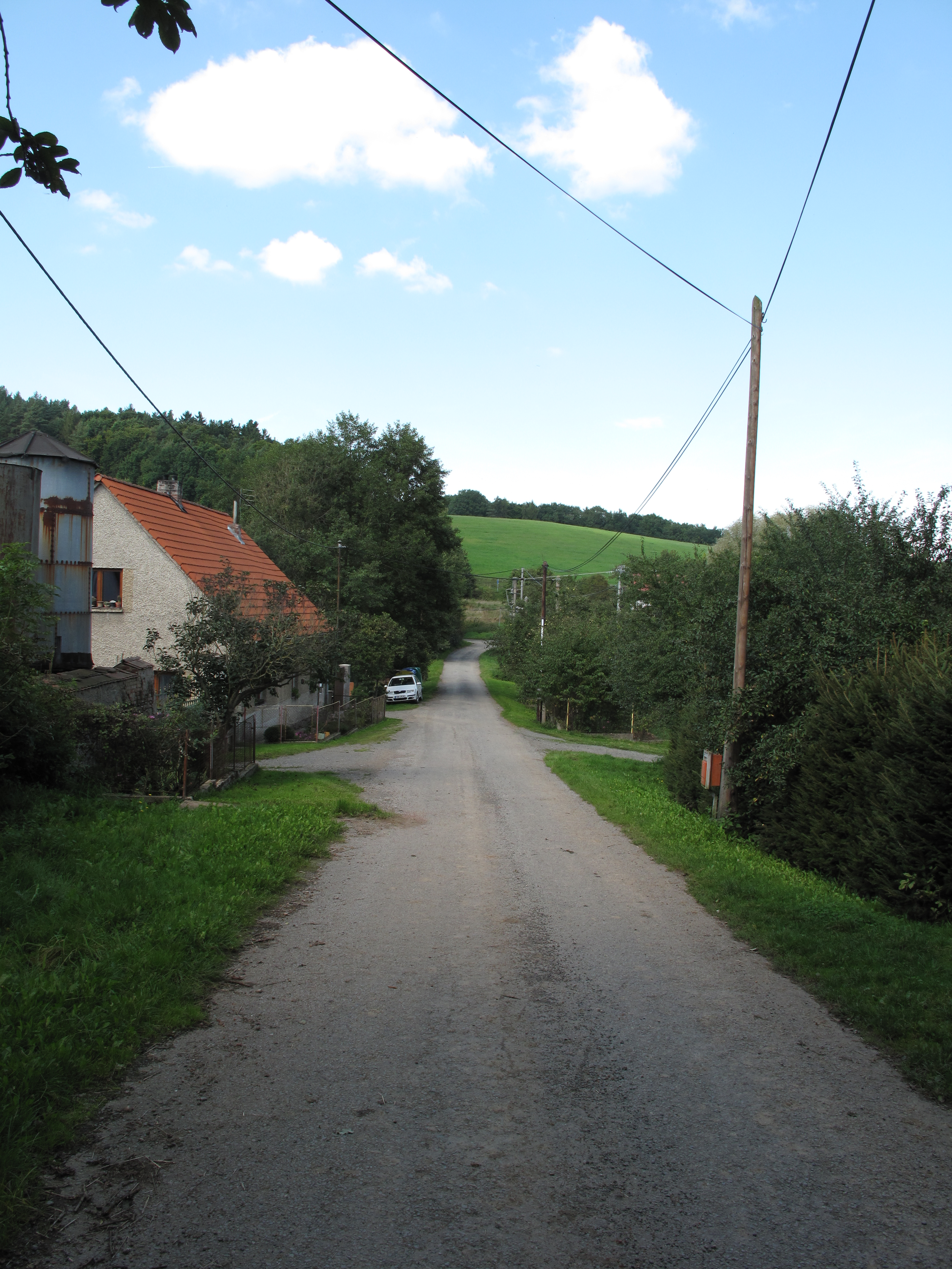 Silnice v Tuchyni. Okres Benešov, Česká republika.